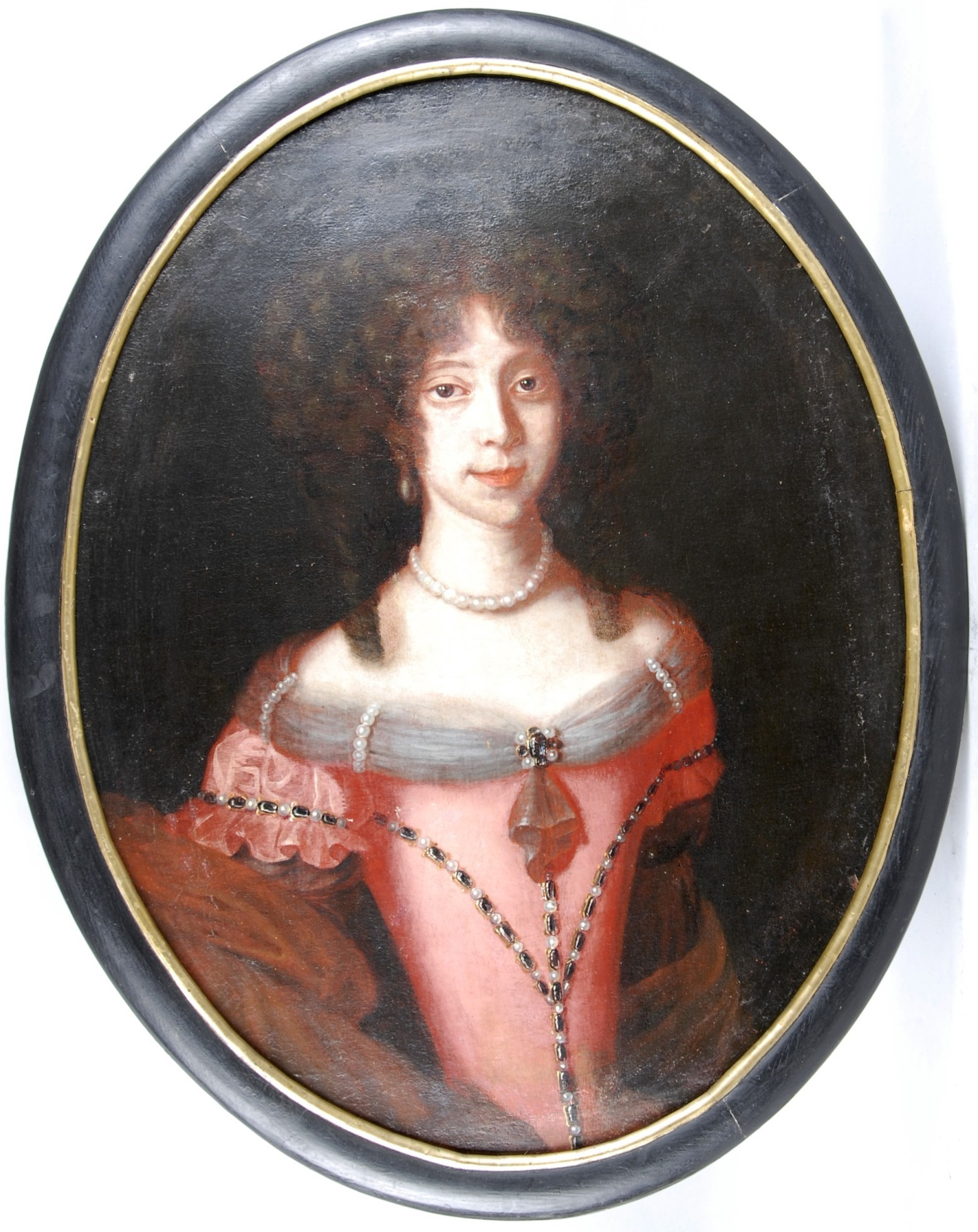 Elenonora Claudie Krakowská z Kolowrat, rozená d´Anquisola (manželka Jana Františka Krakowského z Kolowrat)